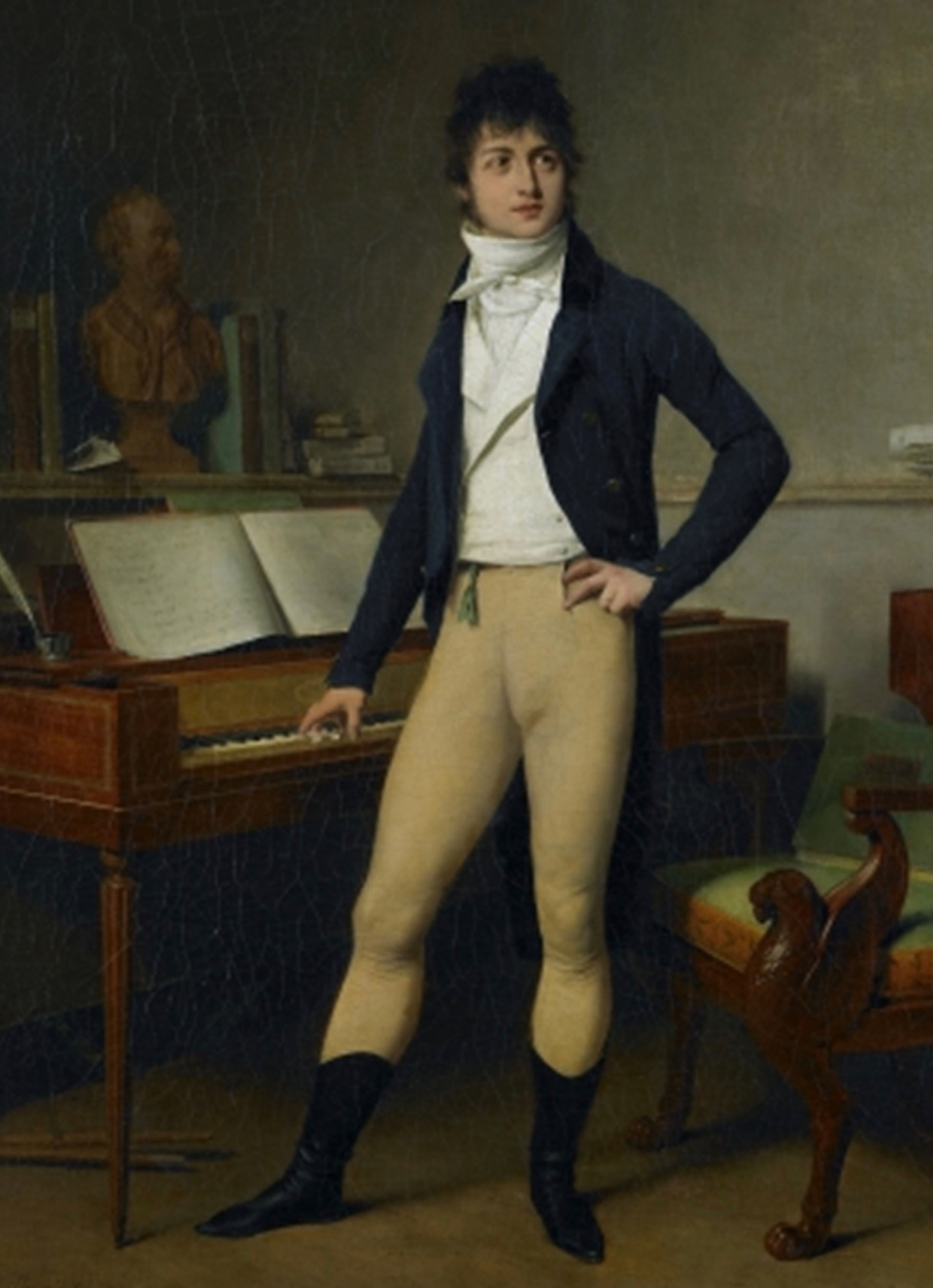 Louis-Léopold Boilly (1761–1845): Der Komponist François-Adrien Boieldieu (1775–1834), Öl auf Leinwand, 65,5 × 54,5 cm (Detail). Musée des beaux-arts de Rouen, Inv.-Nr. 905.1.1 / 1905.1.